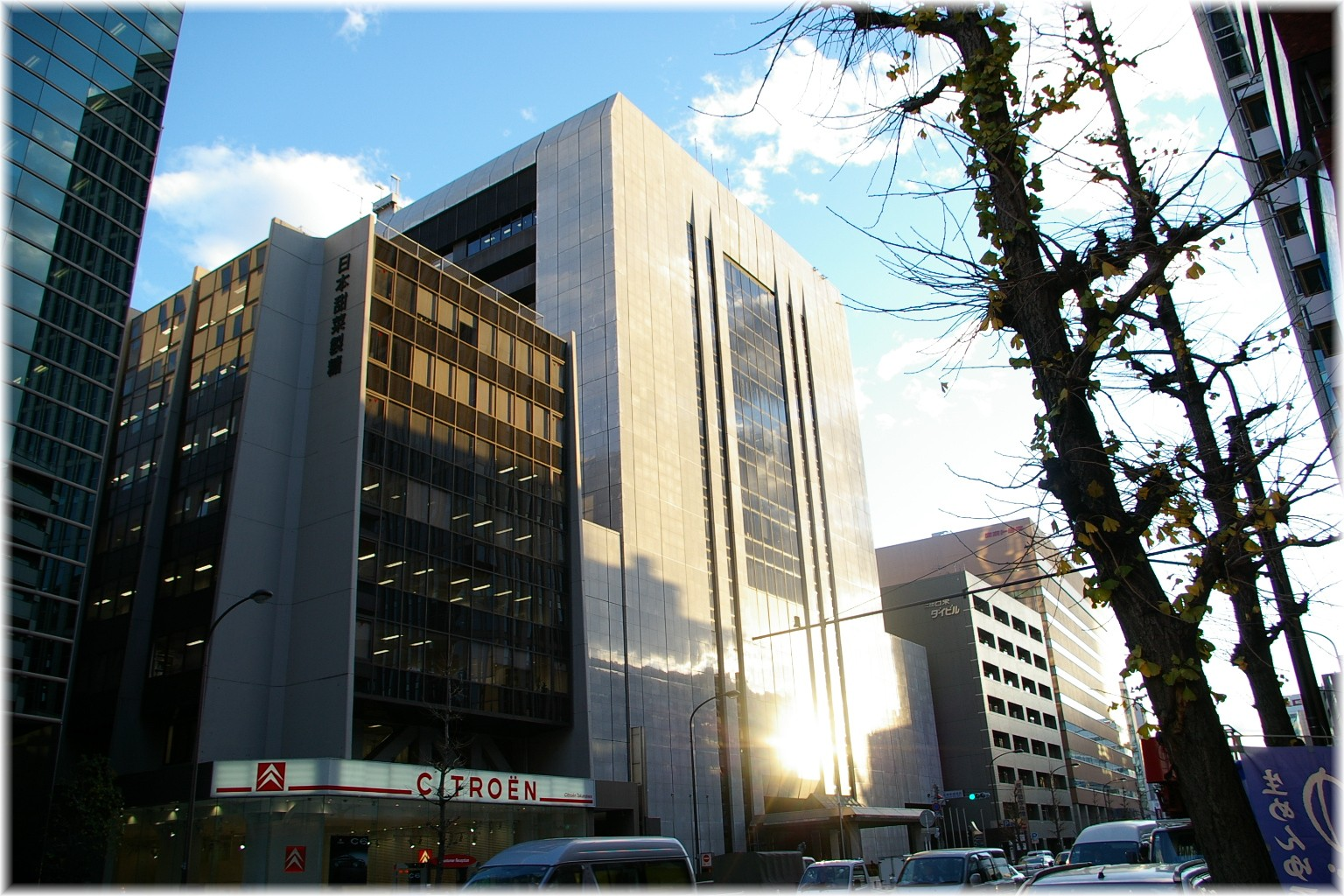 Ich machte dieses Foto von mir in 2006. 笹川記念館